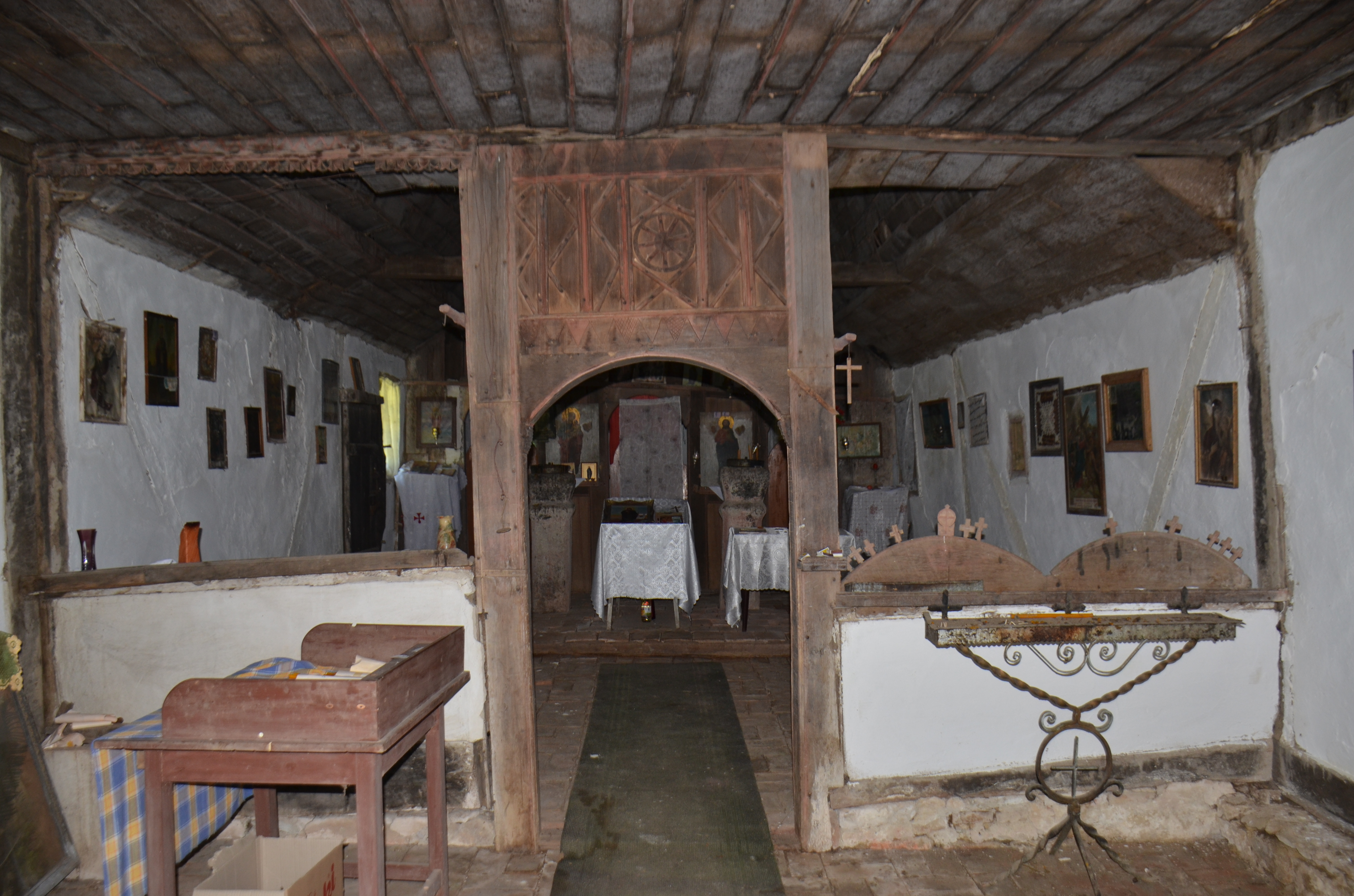 Црква брвнара, село Павловац, општина Топола, Шумадијски округ